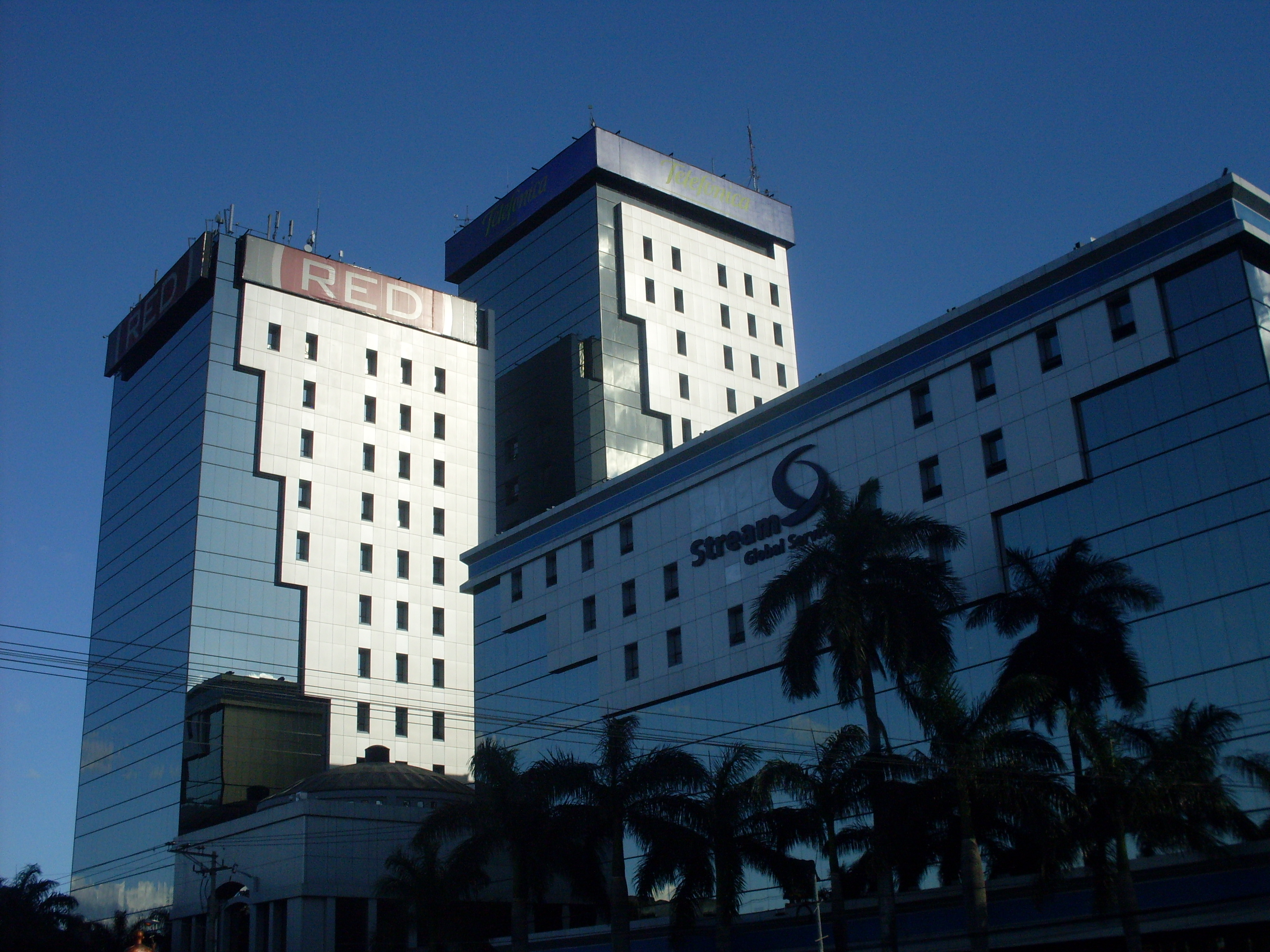 Torres del Centro Financiero Gigante San Salvador